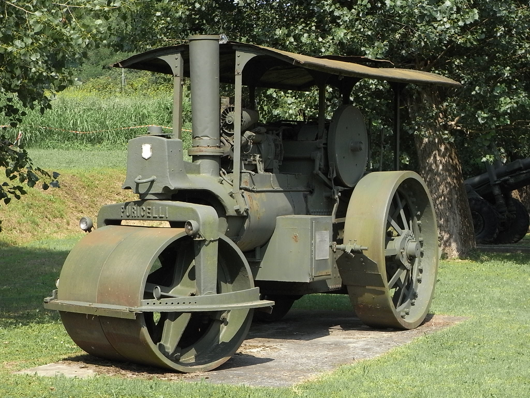 Festung Marghera, historische Dieselwalze von Puricelli